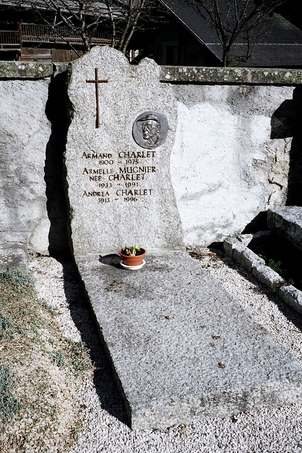 Tombe du guide de montagne Armand Charlet à Argentière (Chamonix, Haute-Savoie, France)